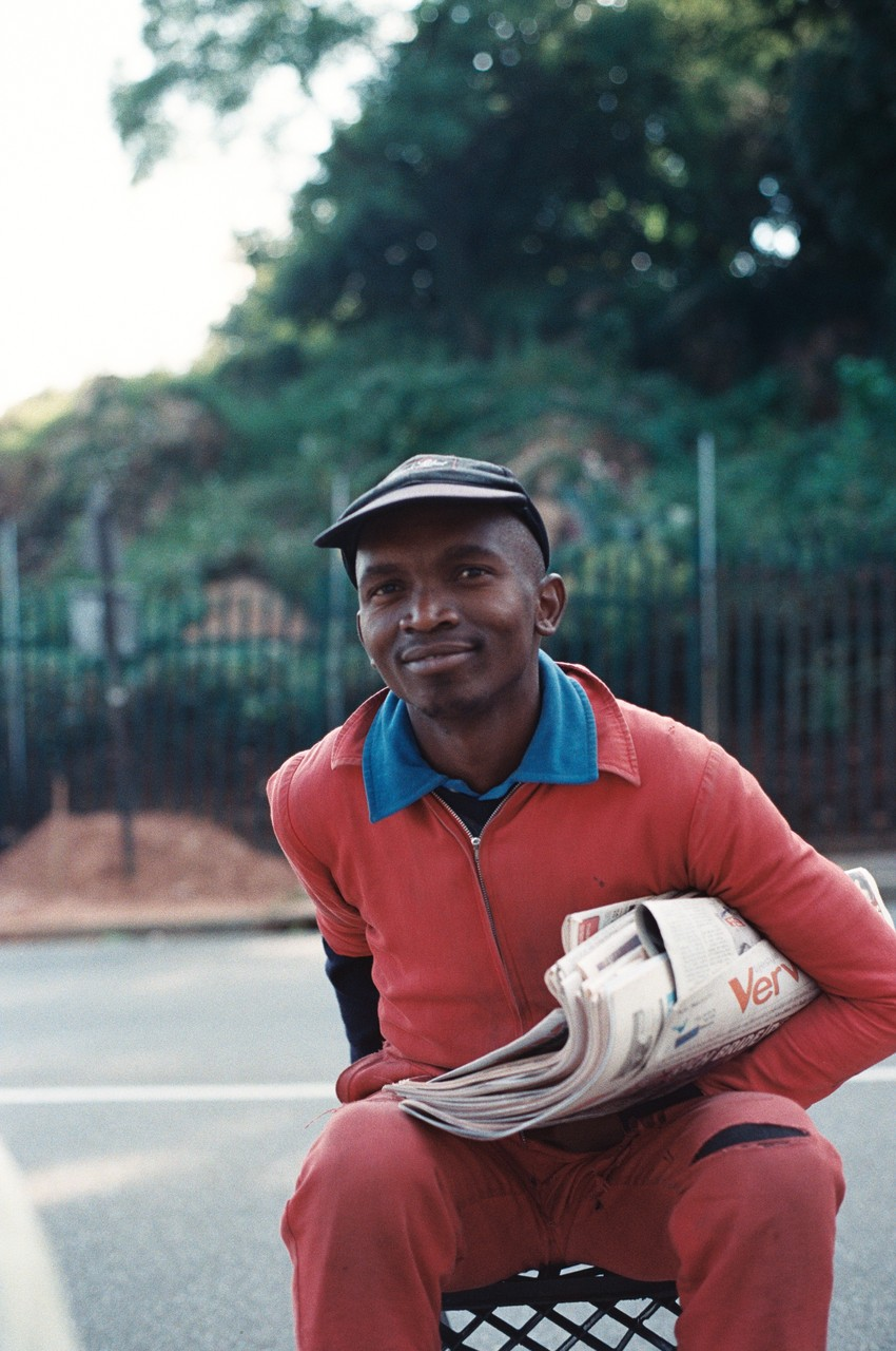 paper man